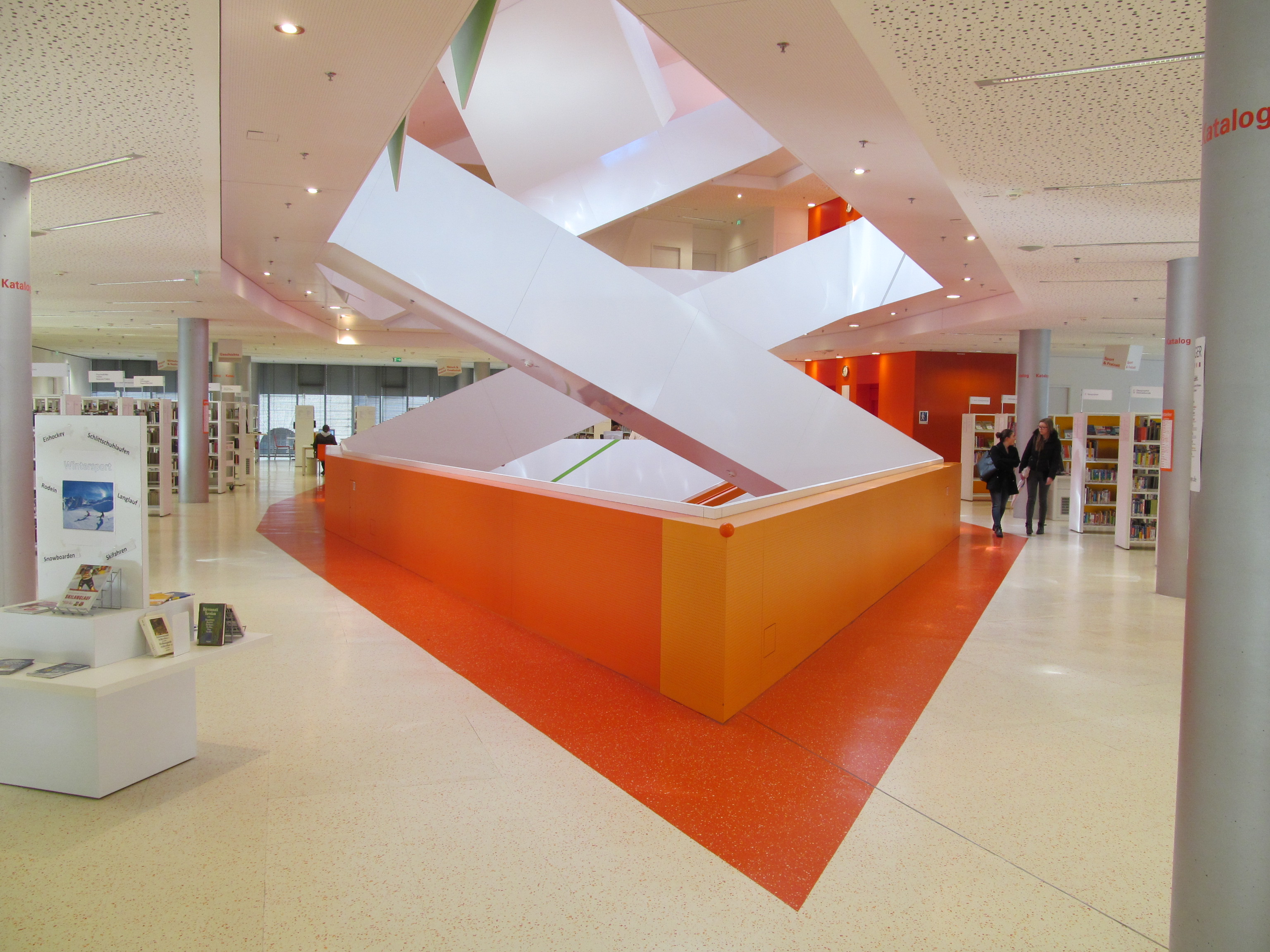 Neue Stadtbücherei Augsburg im 1. Stock Treppenaufgang.